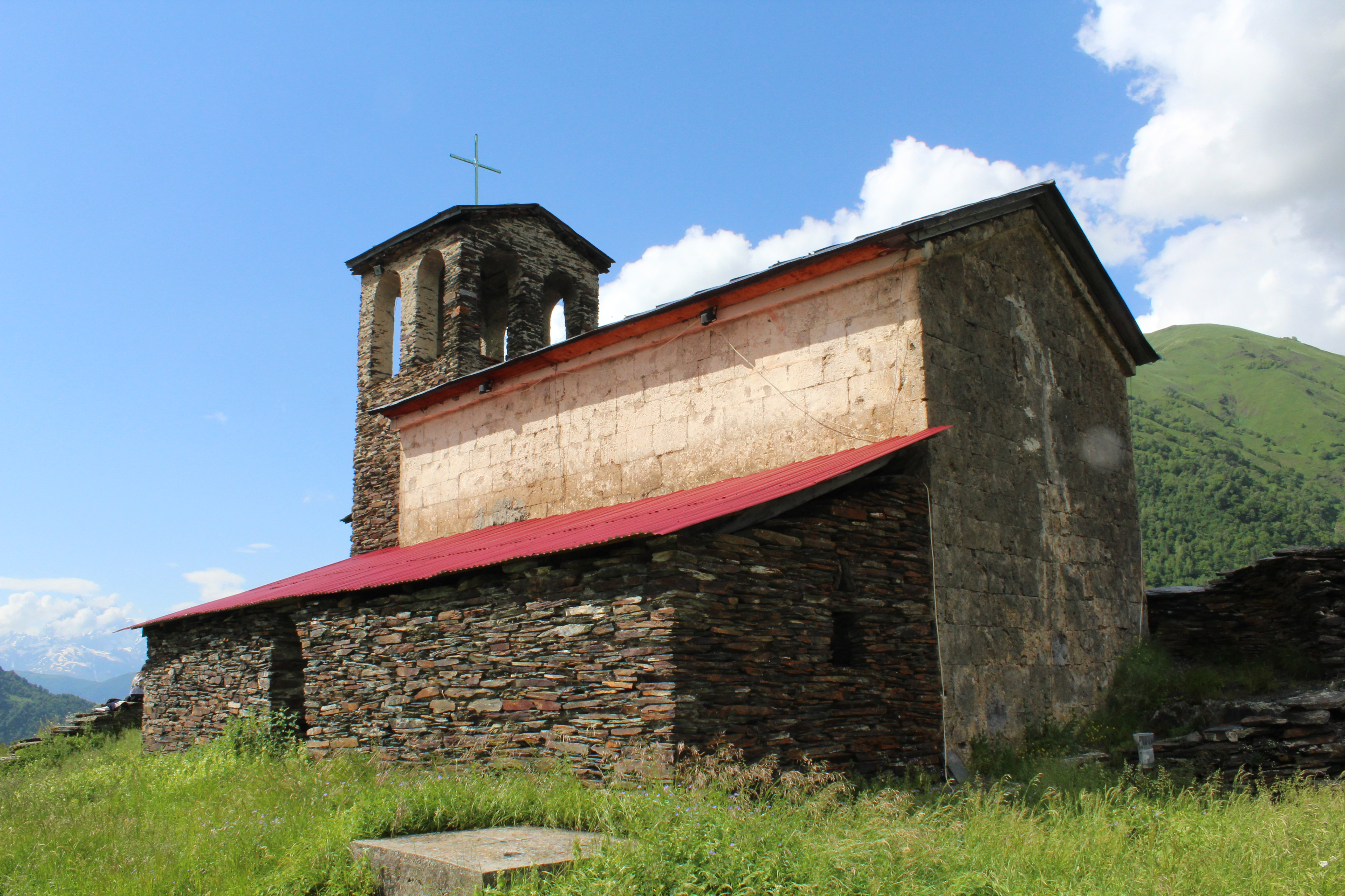 წმ. კვირიკეს და ივლიტას ეკლესია „ლაგვირკა“